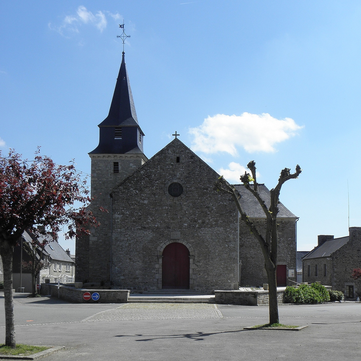 Église Saint-Pierre de Saint-Carné (22). Façade occidentale.